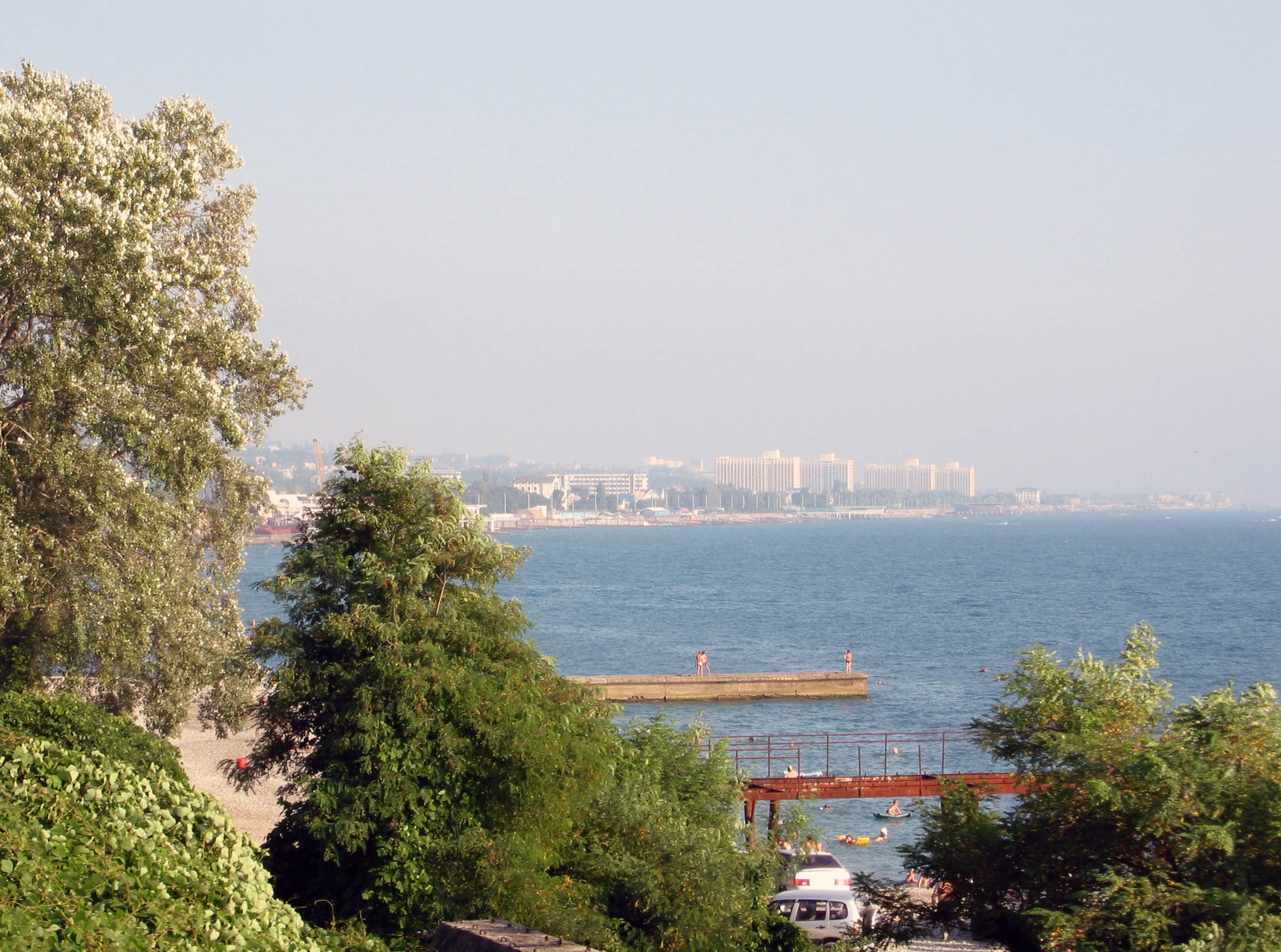 вид на курортный городок Адлера с побережья Хосты